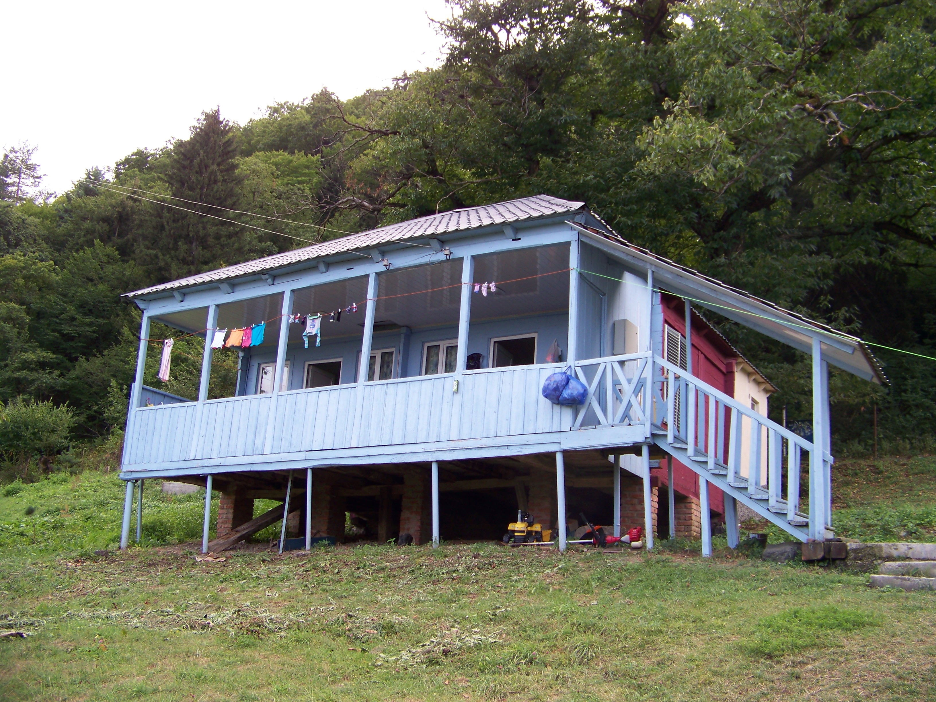 ალექსანდრე ციმაკურიძის საცხოვრებელი სახლი